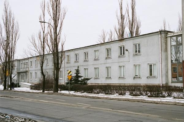 Budynek B